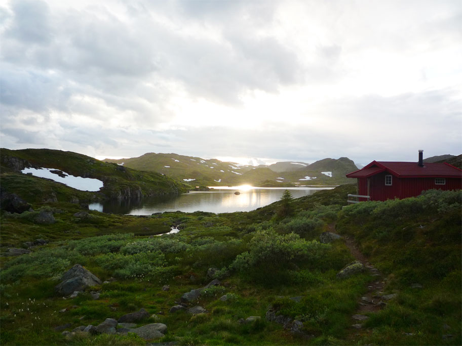 DNT hytta Sloaros i Setesdal vesthei Ryfylkeheiane landskapsvernområde